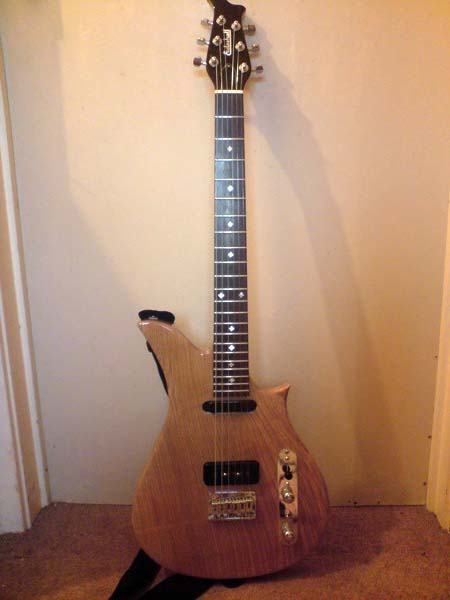 Eccleshall Scimitar electric guitar